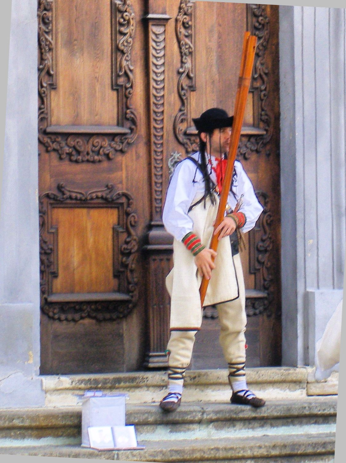 Musikant (Spieler auf Fujara) auf dem Hauptplatz, Bratislava